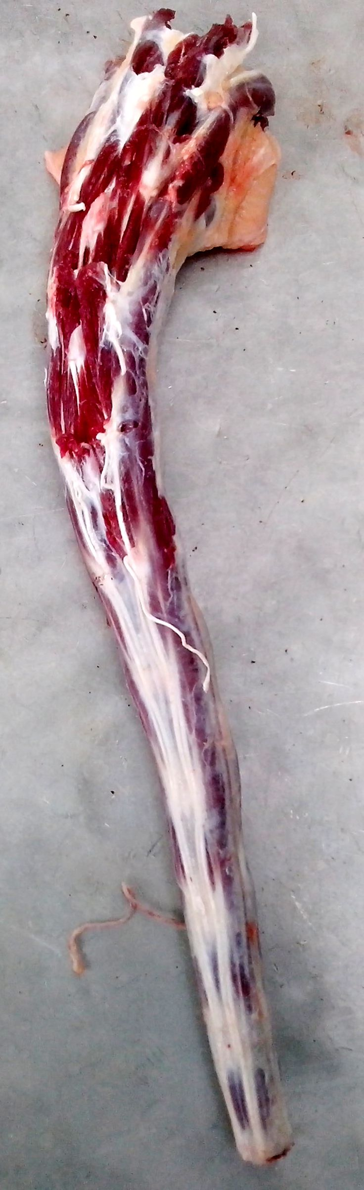 İnək quyruğu